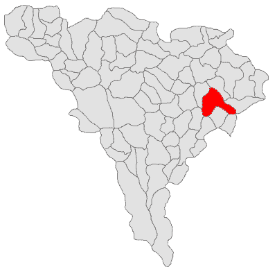 Categorie:Hărţi ale judeţului Alba